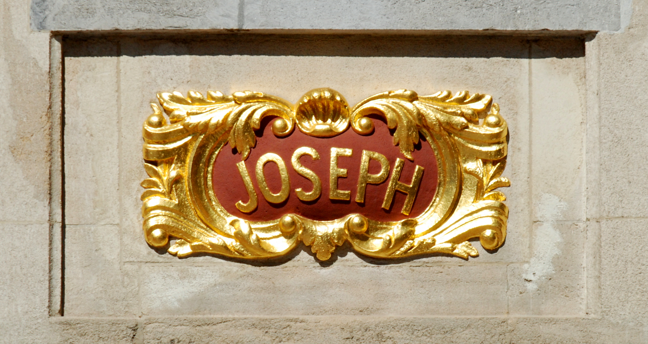 Belgique - Bruxelles - Grand-Place - Maison de Joseph et Anne